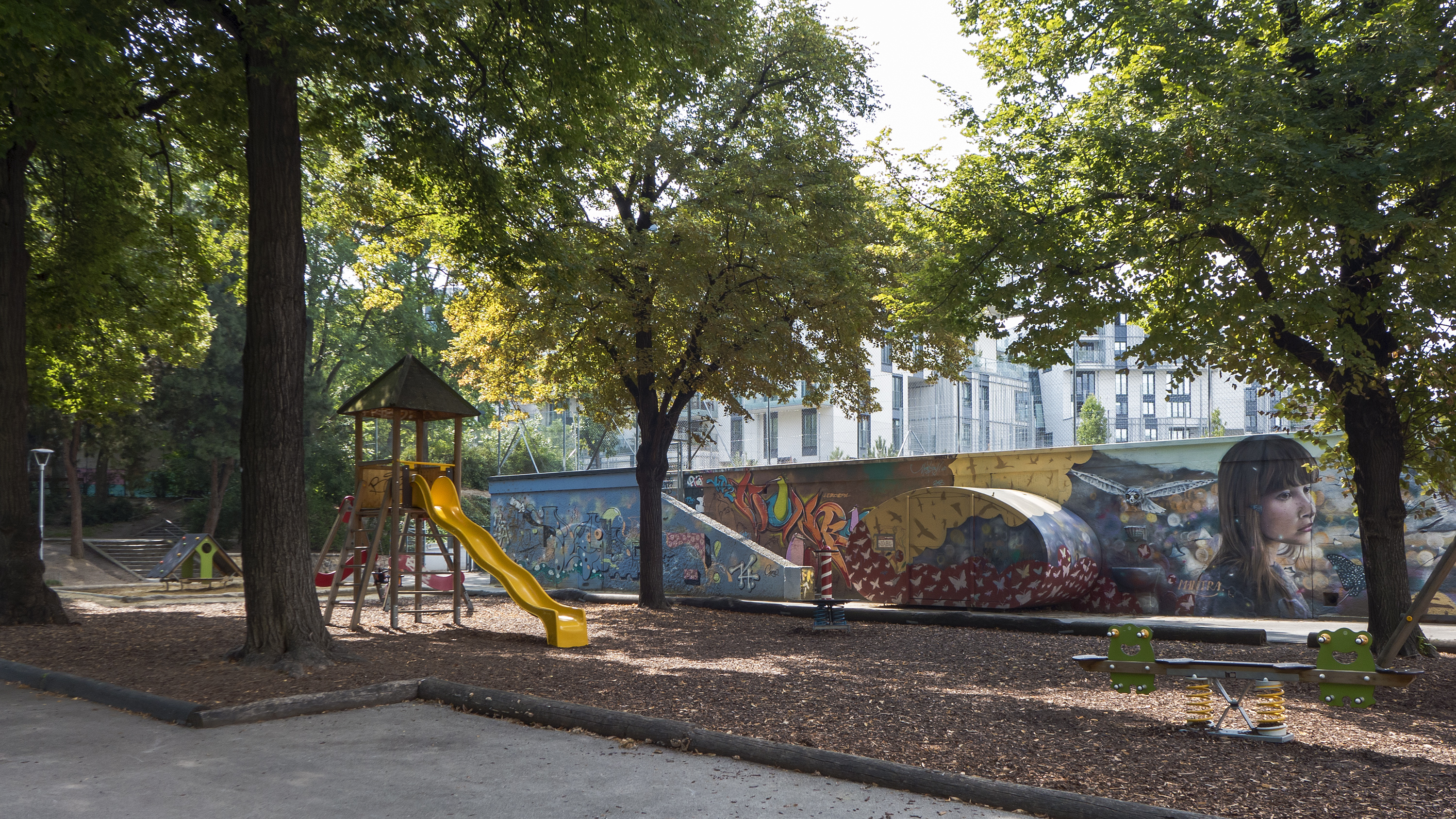 Arne-Carlsson-Park in Wien 9